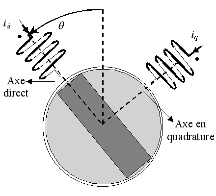 2 enroulements statoriques (notés généralement d et q), tournant avec le rotor, en quadrature. Pour article commande vectorielle. Deessin perso Licensing Catégorie:Schémas